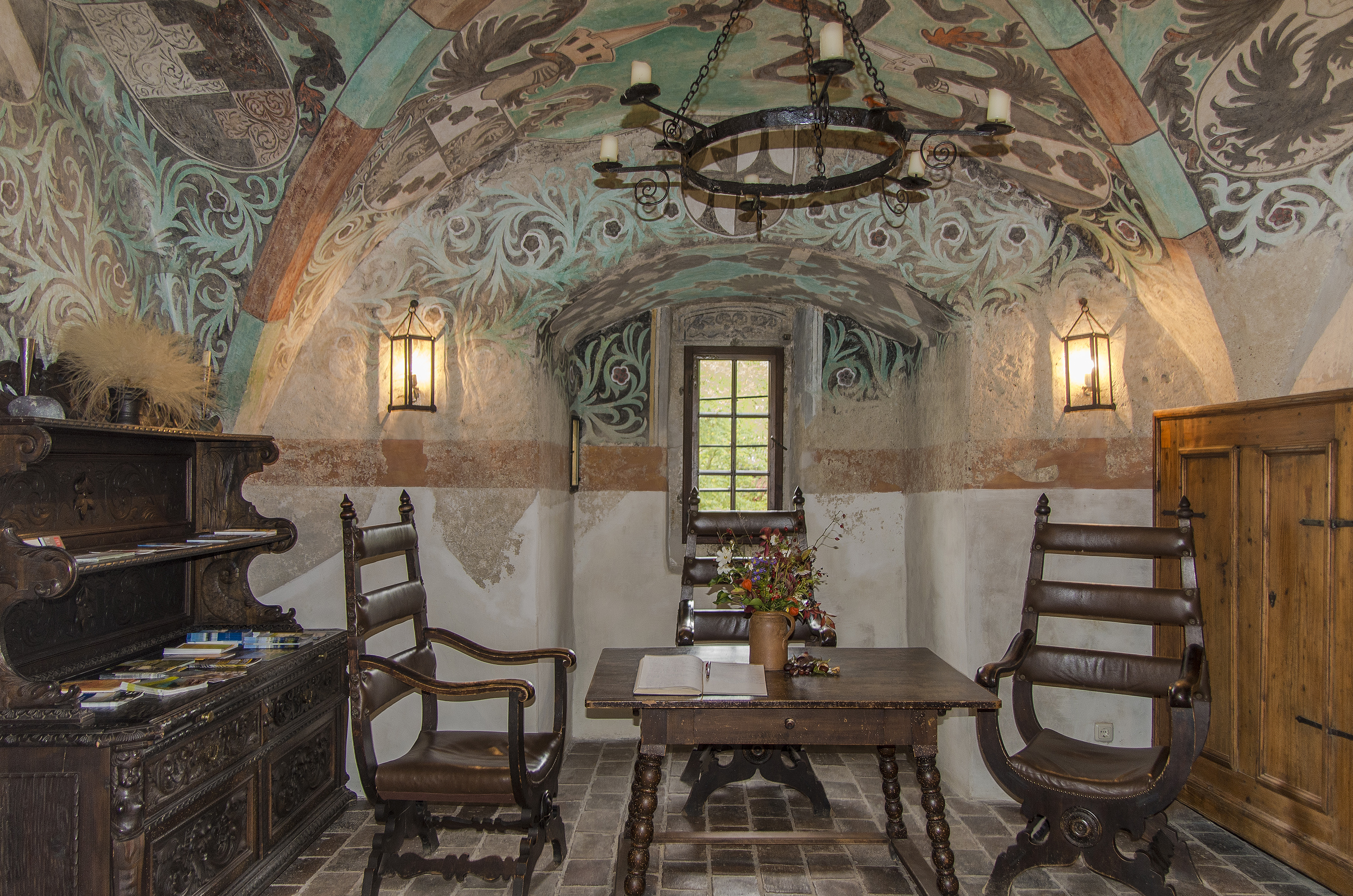 Burg Oberranna-Empfangshalle